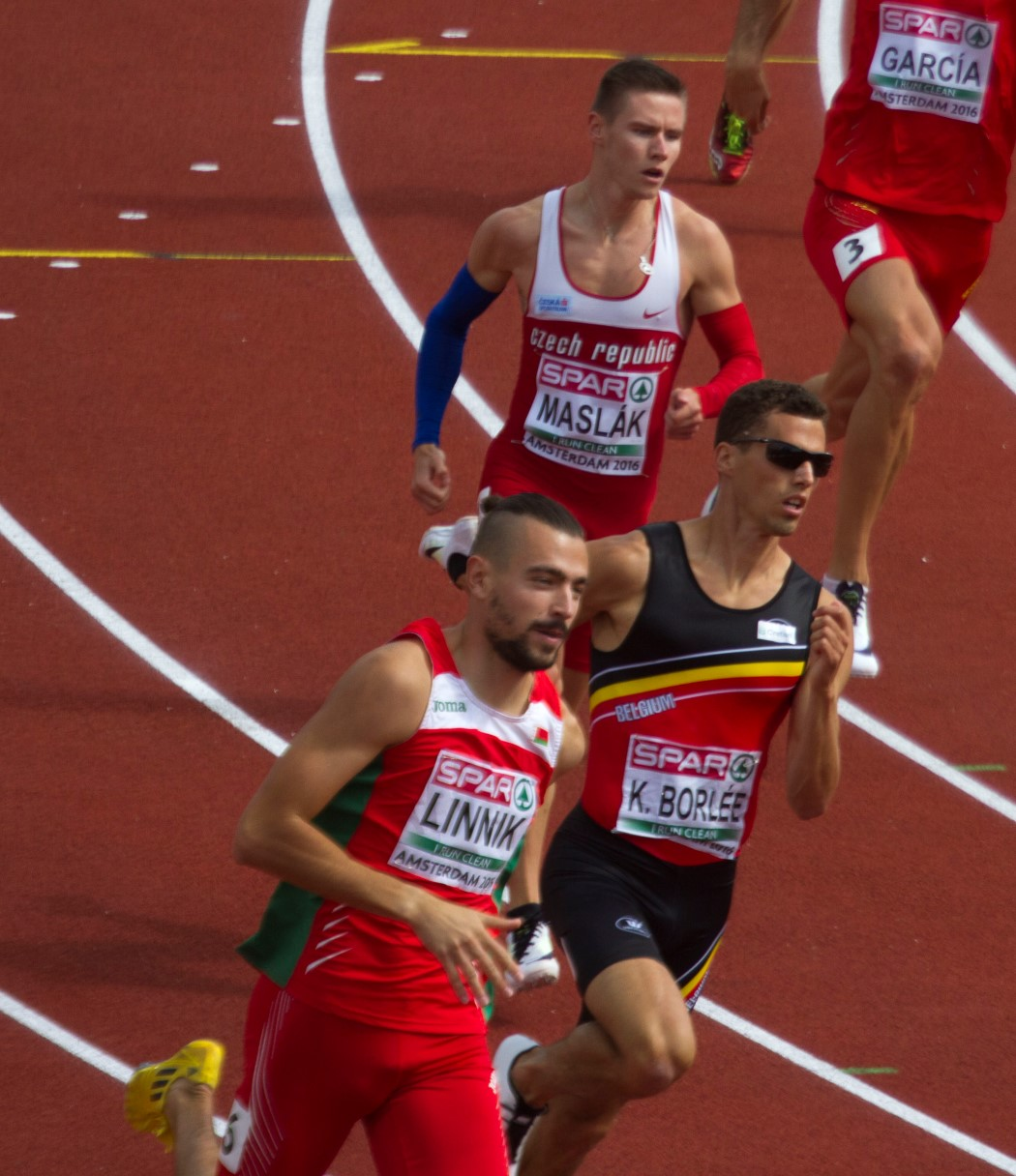 0578 kevin borlee reeksen 400m